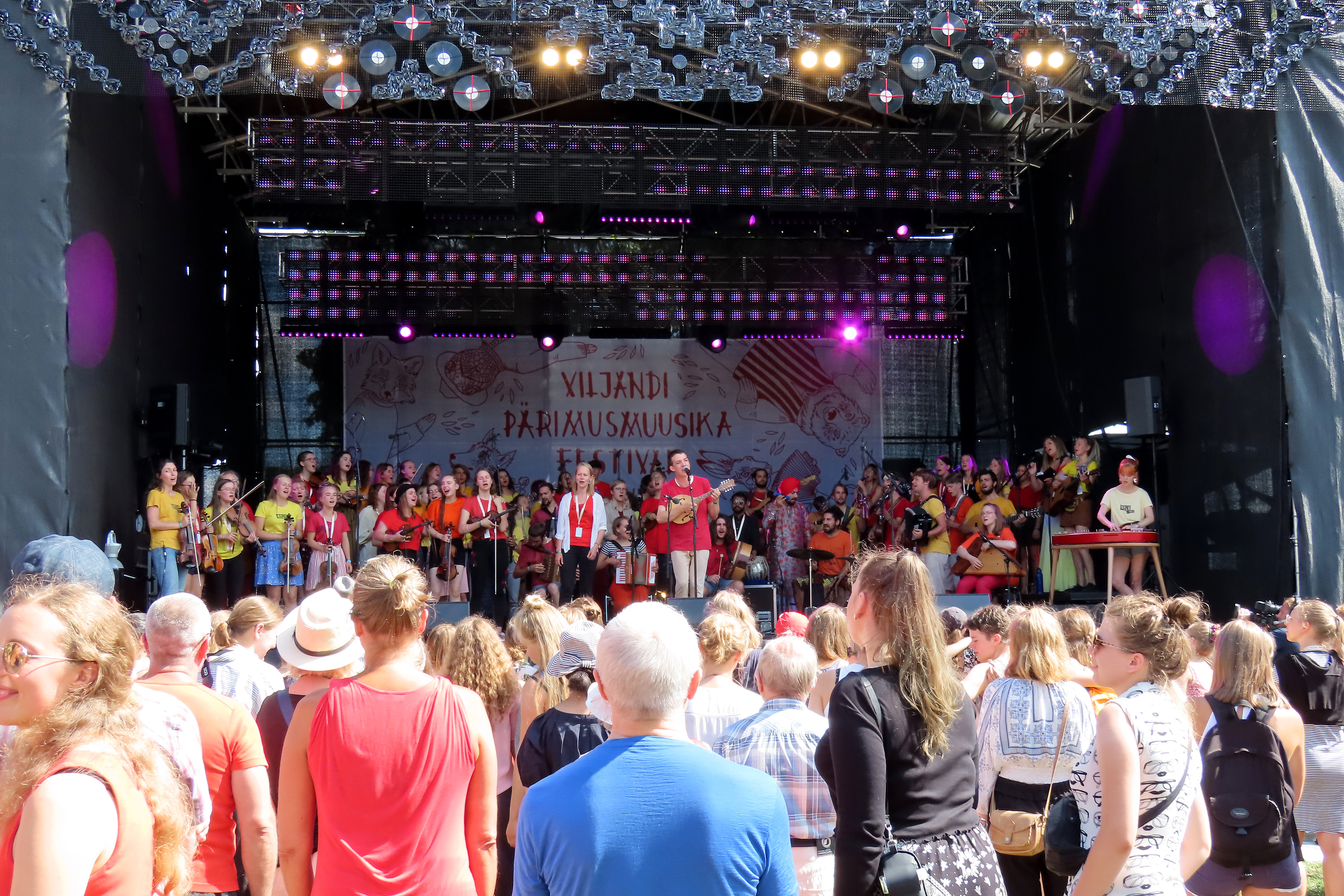 Eesti ETNO laagrist osavõtjad esinemas Viljandi pärimusmuusika festivalil Kirsimäe laval 2019. aastal